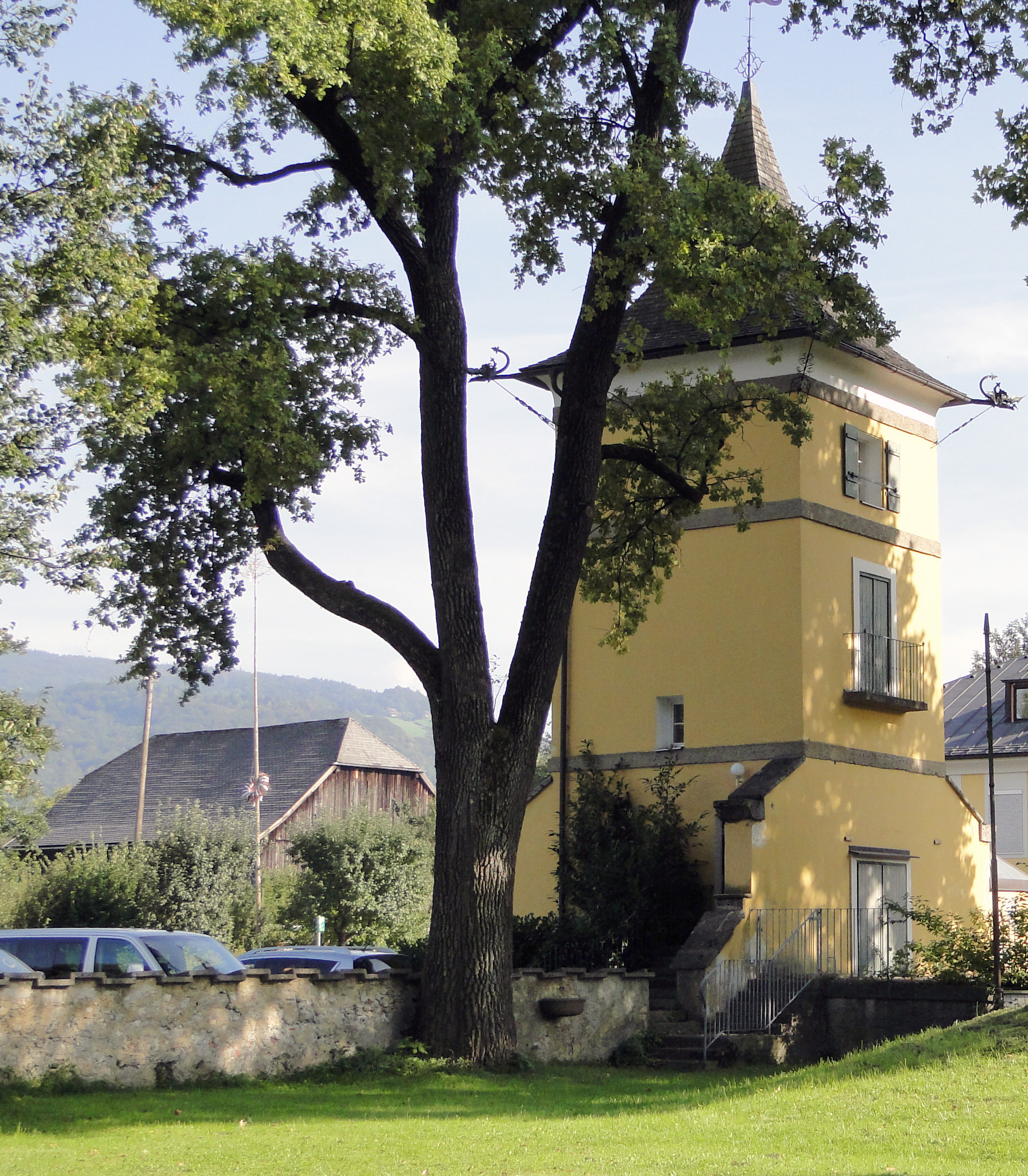 Schloss Fronburg, Gesamtanlage samt Umfassungsmauer, Park und sonstigen Objekten